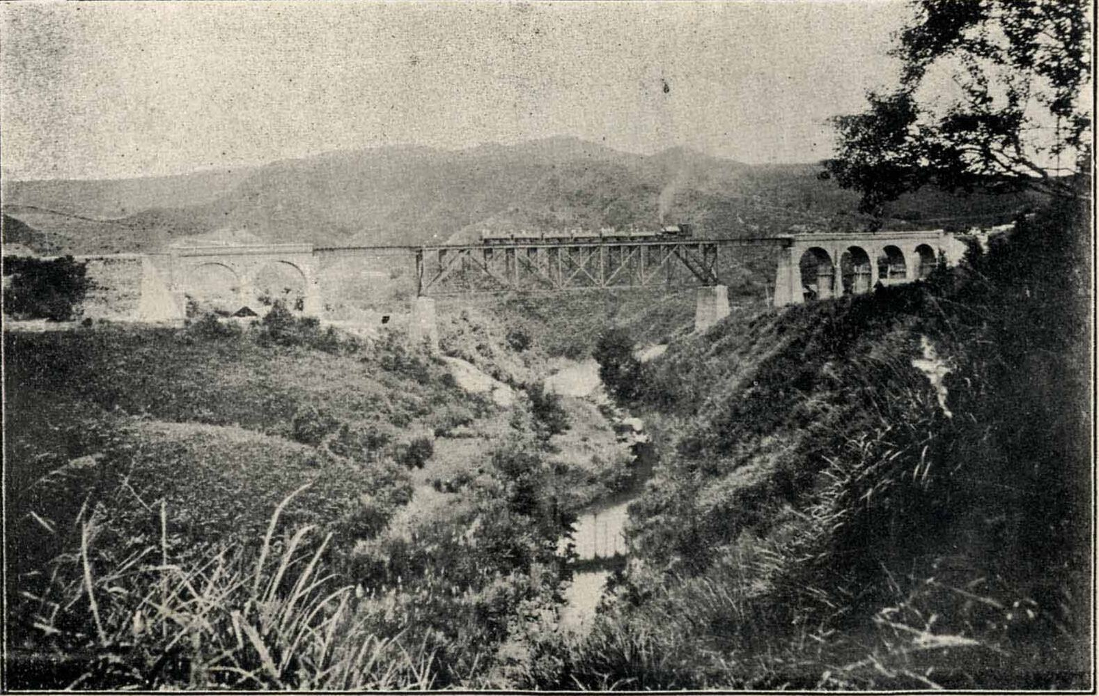 魚藤坪溪橋樑。斷掉之前的魚籐坪斷橋